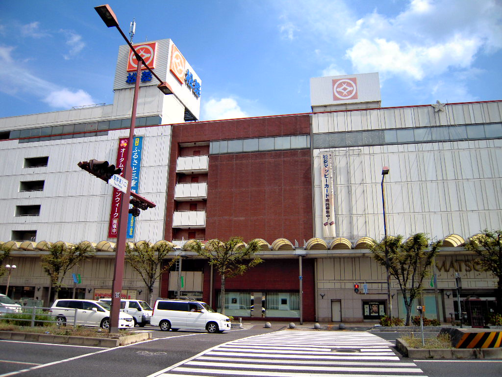 津松菱百貨店外観